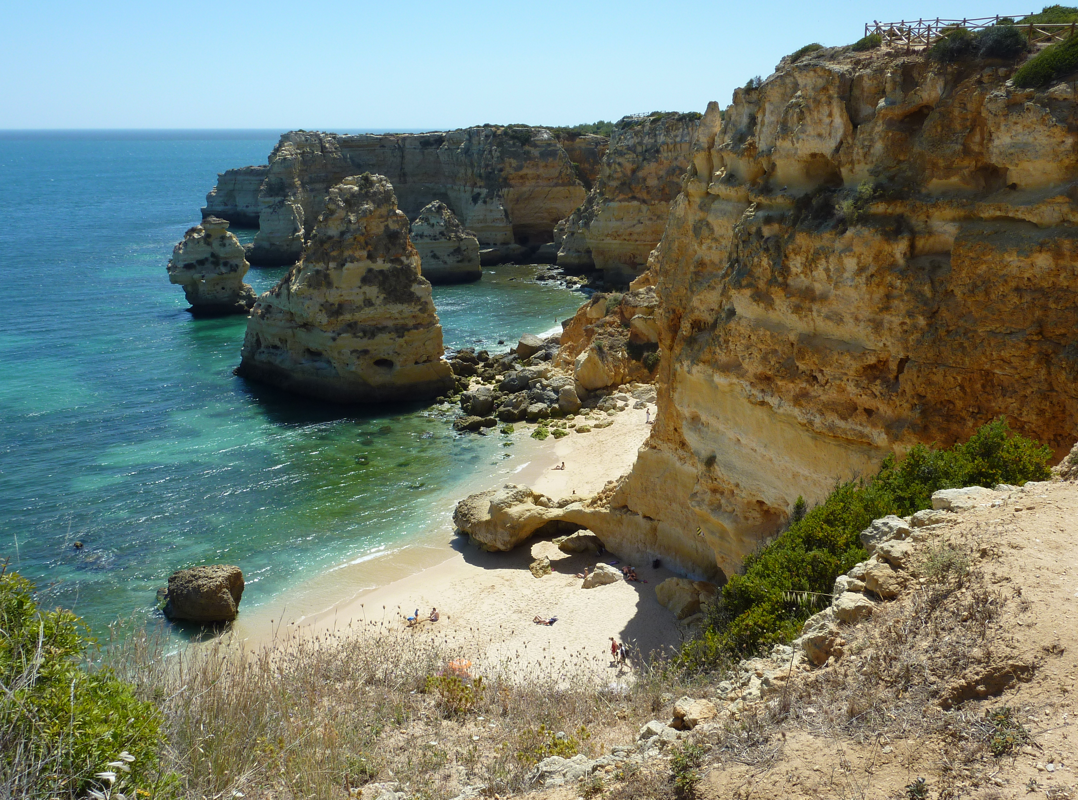 Praia Marinha, Algarve